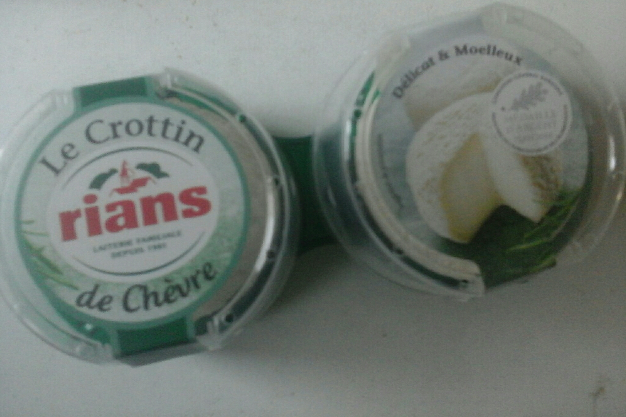 Le crottin de chèvre de Rians. Laiterie H. Triballat.